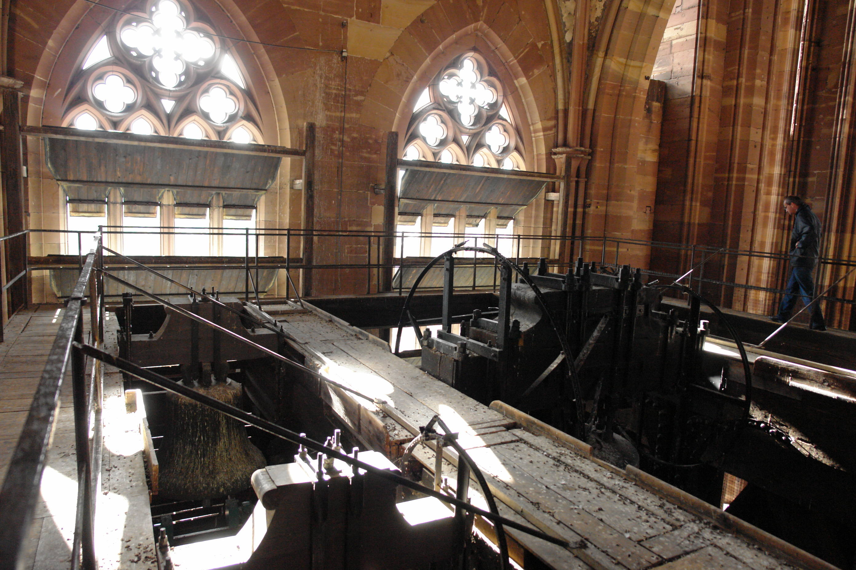 Vue au dessus des berceaux des cloches de la Cathédrale de Strasbourg .